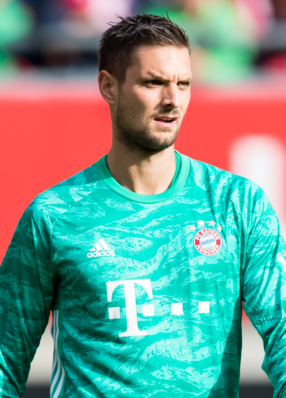 during 1.FC Kaiserslautern vs FC Bayern München at Fritz-Walter-Stadion, Kaiserslautern, Rheinland-Pfalz, Germany on 2019-05-27, Photo: Sven Mandel